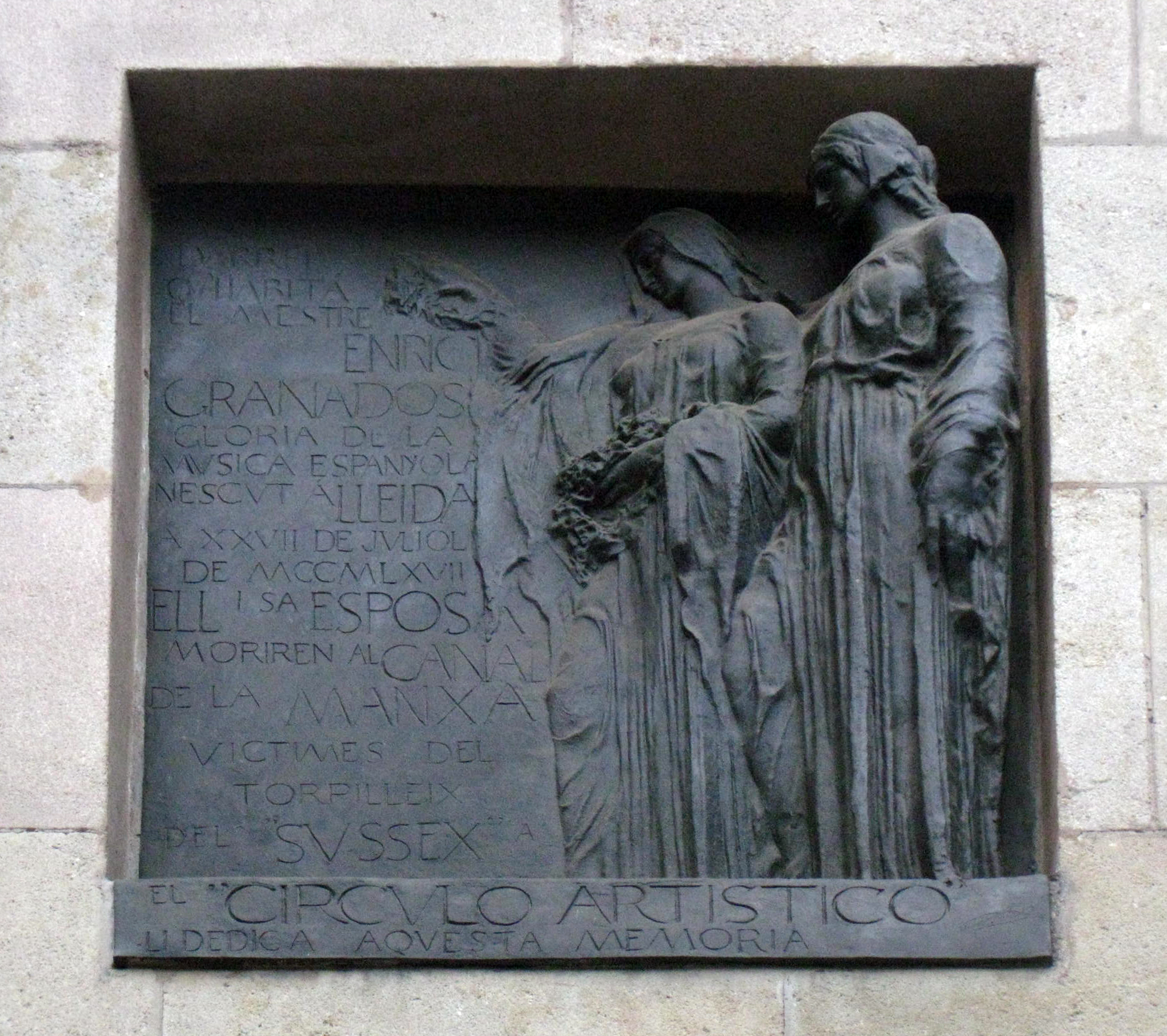 Enric Granados. C. Girona, 20 (Barcelona)